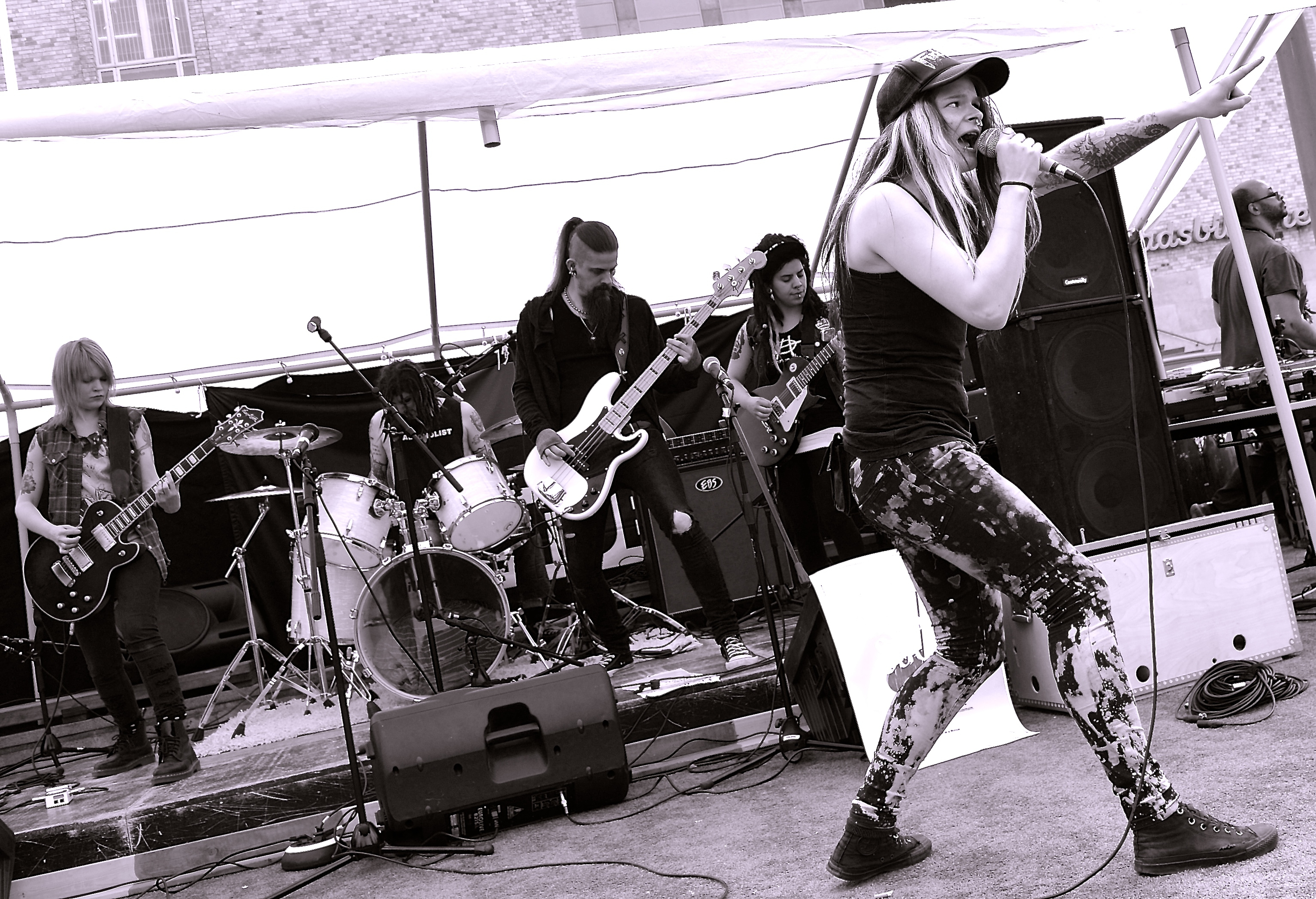 Fuck Frankie på Nationaldagen 2014 på Medborgarplatsen i Stockholm.